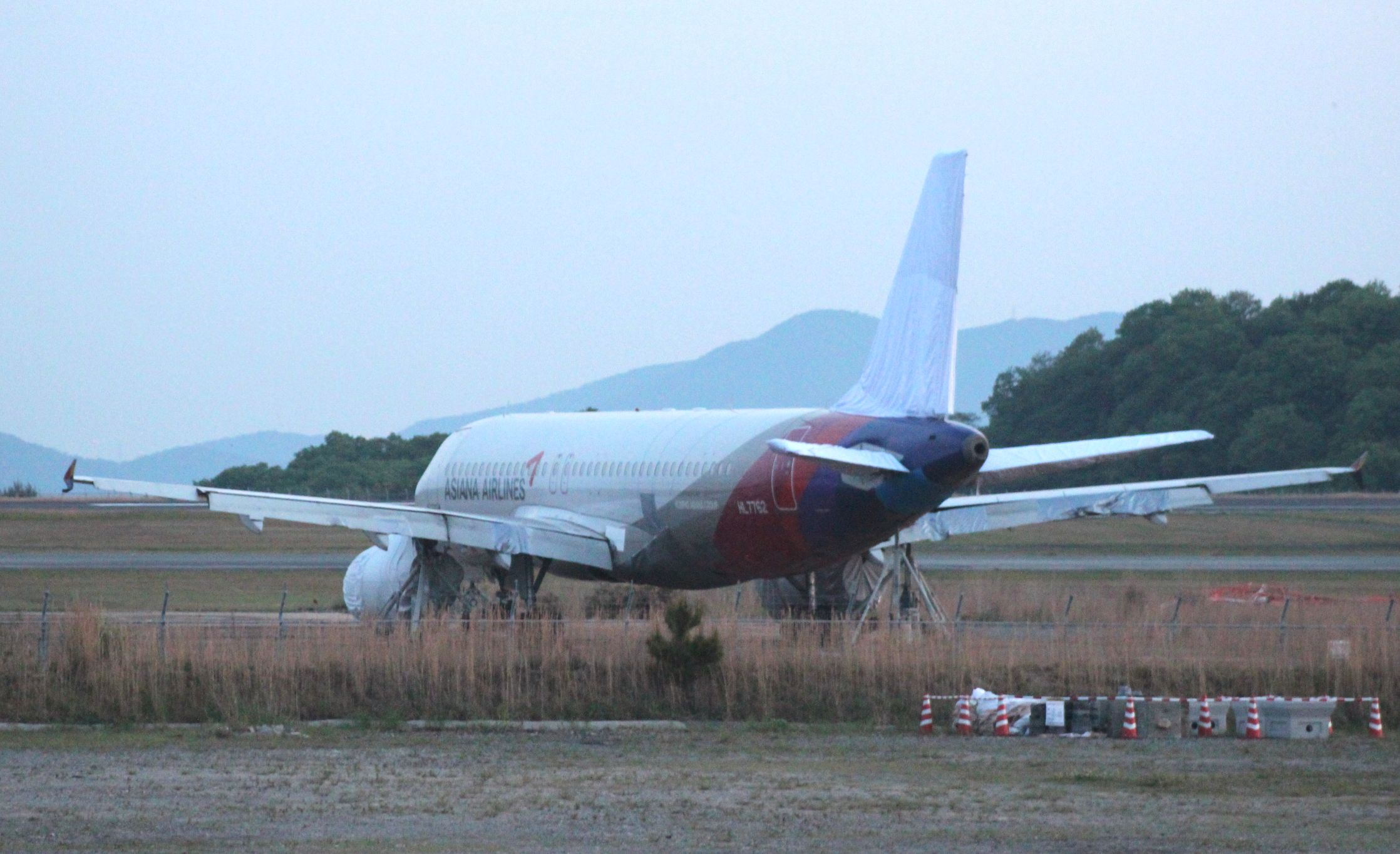 アシアナ航空162便着陸失敗事故の事故機（HL7762）